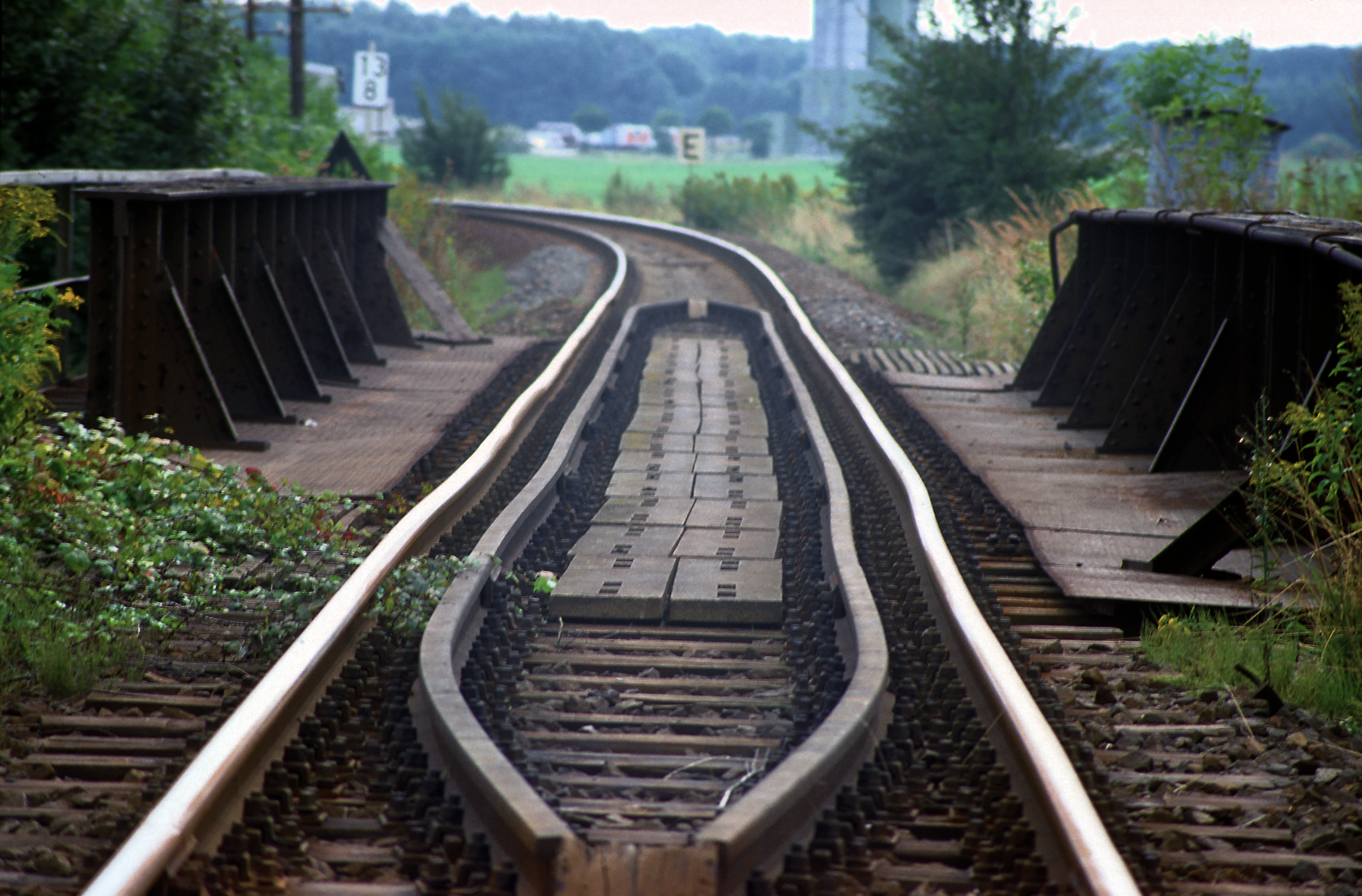 Nach dem Unfall in der Nacht vom 12. zum 13. September, Richtung Geithain. Das Nordende des Überbaues ist aus den Lagern gerissen und in Blickrichtung nach rechts verschoben worden. Der Sattelzug mit einem Bagger auf dem Auflieger kam aus Richtung Großpösna (von links, Eisenbahnstrecke und Straße kreuzen in spitzem Winkel) und fuhr stadteinwärts. Der Schaden scheint auf den ersten Blick von oben beherrschbar zu sein, doch ist der Überbau material- und altersbedingt unreparierbar beschädigt.Die Brücke ist nach dem Unfall in der Nacht wohl irrtümlich noch einmal befahren worden, zum Aufnahmezeitpunkt gegen 8.00 morgens war die Strecke jedoch schon gesperrt.